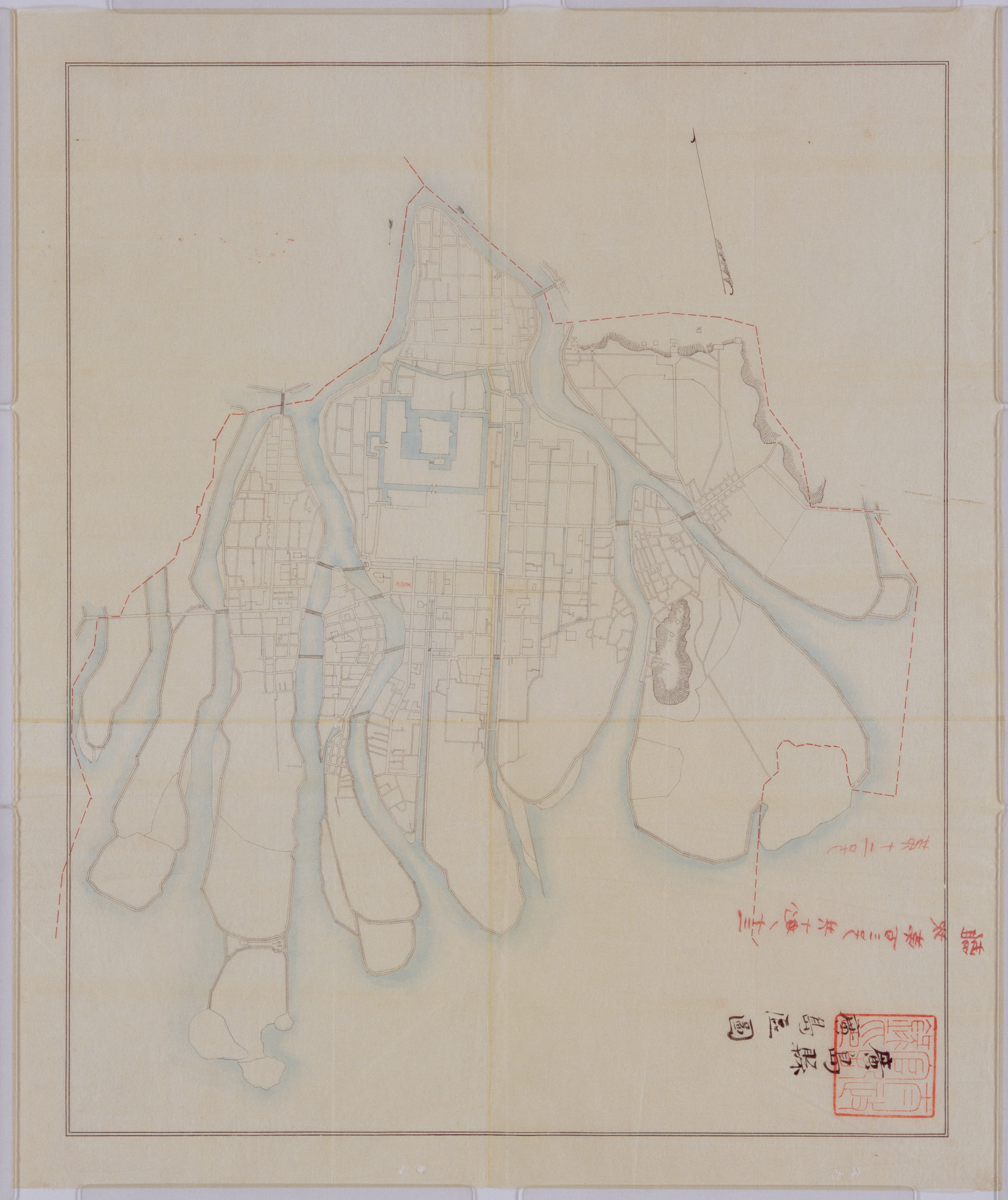 府県新設区ノ図広島。1880年（明治13年）太政官布告。